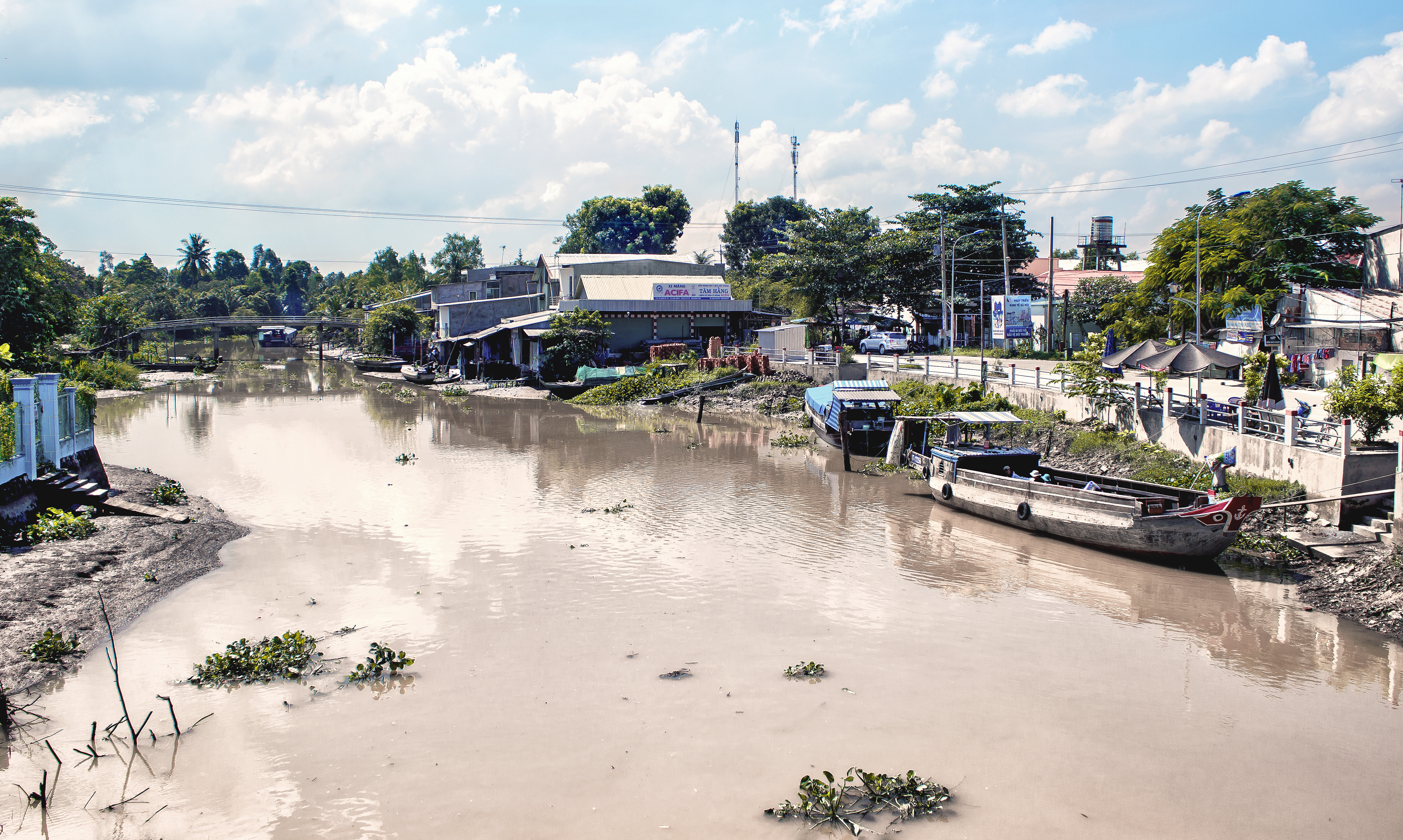 Rạch Nước Xoáy ở phía trước chợ Nước Xoáy, thuộc ấp Hưng Mỹ Tây, thuộc xã Long Hưng A, huyện Lấp Vò, Đồng Tháp, Việt Nam.